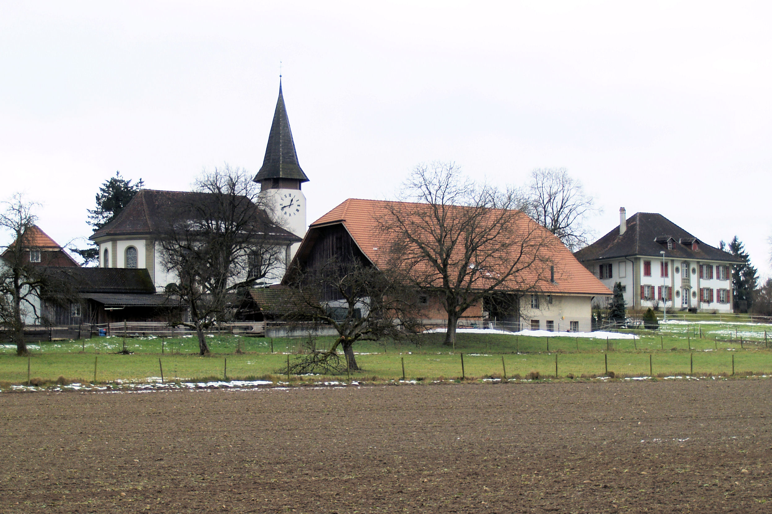 Kirche von Grafenried (Ansicht von Norden)